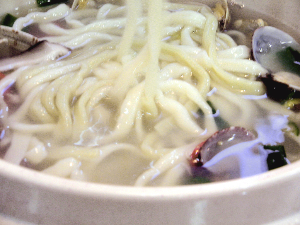 Kalguksu